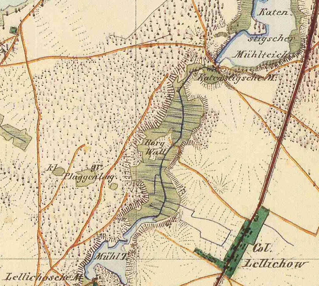 Lellichow, Ortsteil der Stadt Kyritz, Landkreis Ostprignitz-Ruppin, Brandenburg, Ausschnitt aus dem Urmesstischblatt 2940 Blumenthal von 1841